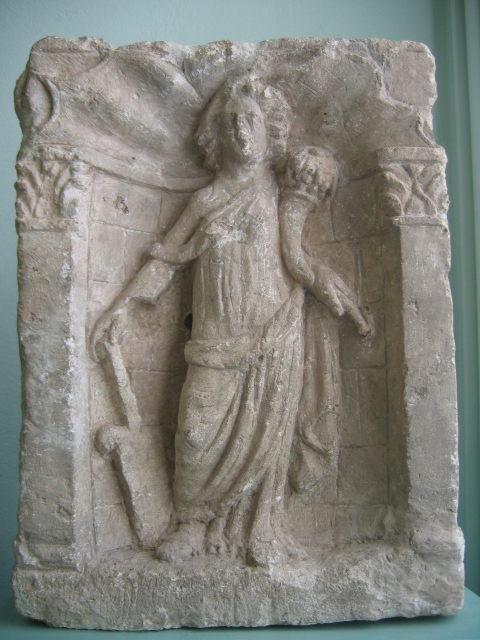 Autun, musée Rolin : statuette de l'abondance